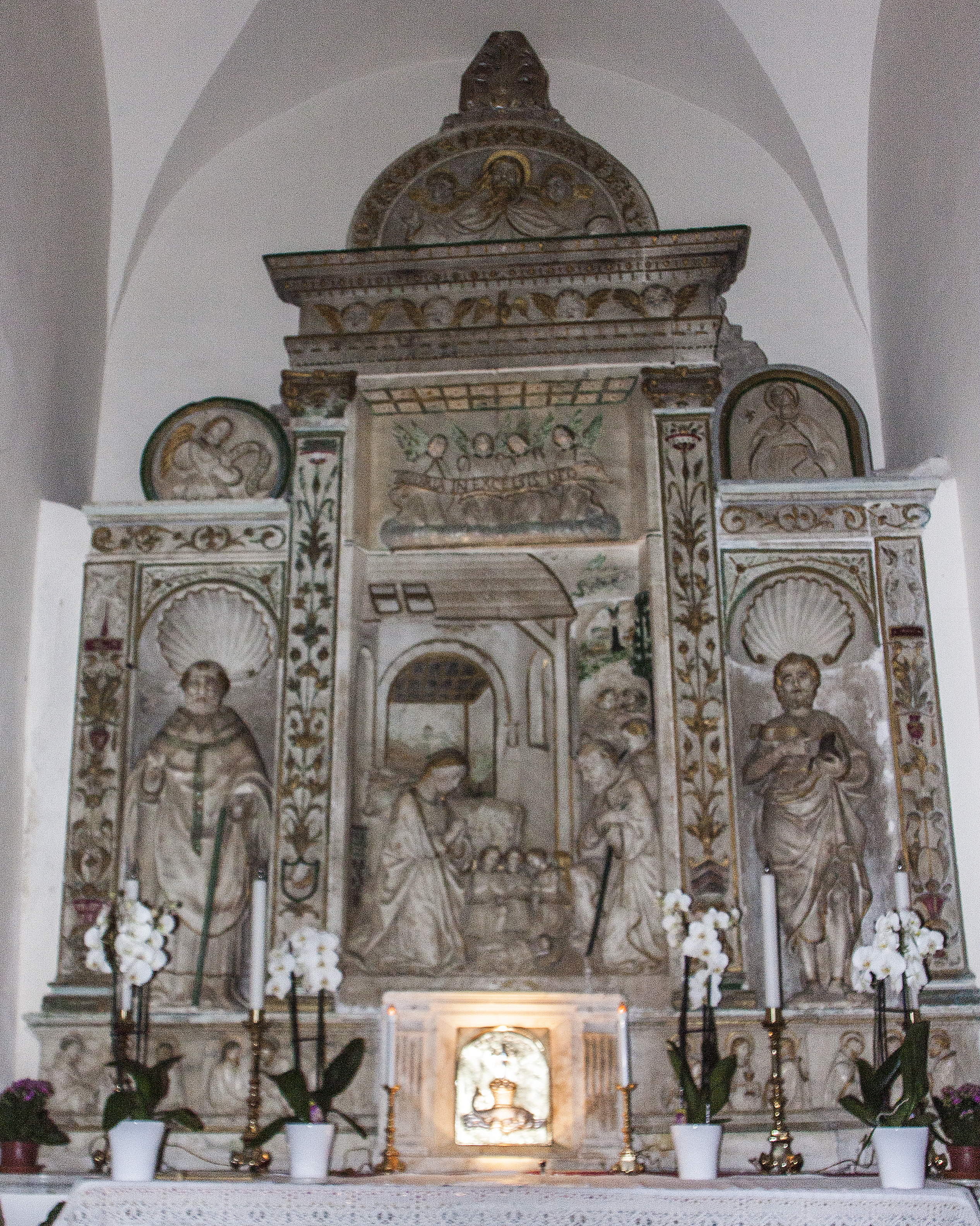 Opera di Antonello Gagini